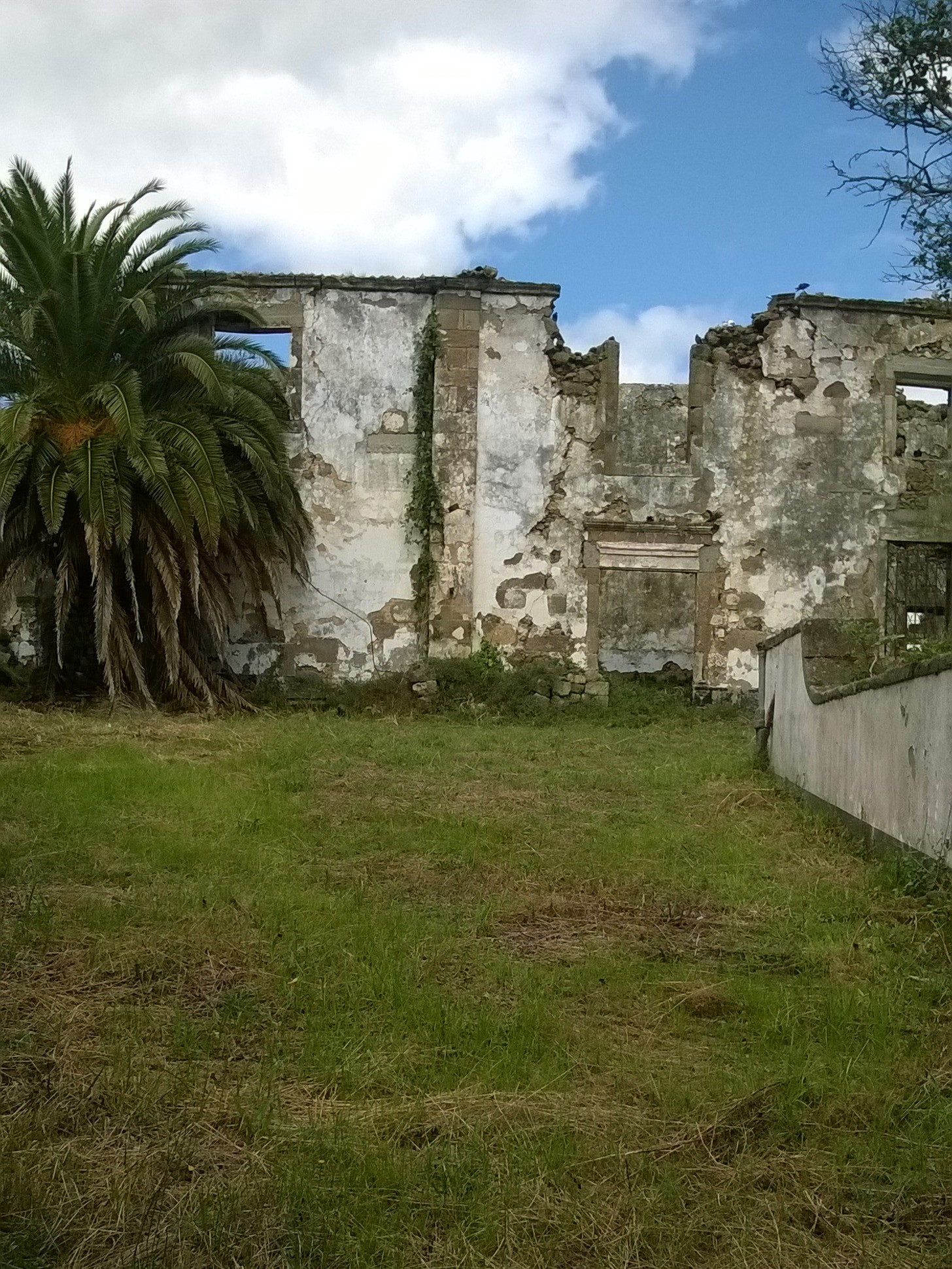 Convento de Nossa Senhora da Conceição, freguesia de Nossa Senhora da Conceição, concelho de Angra do Heroísmo, Ilha Terceira, Região Autónoma dos Açores.